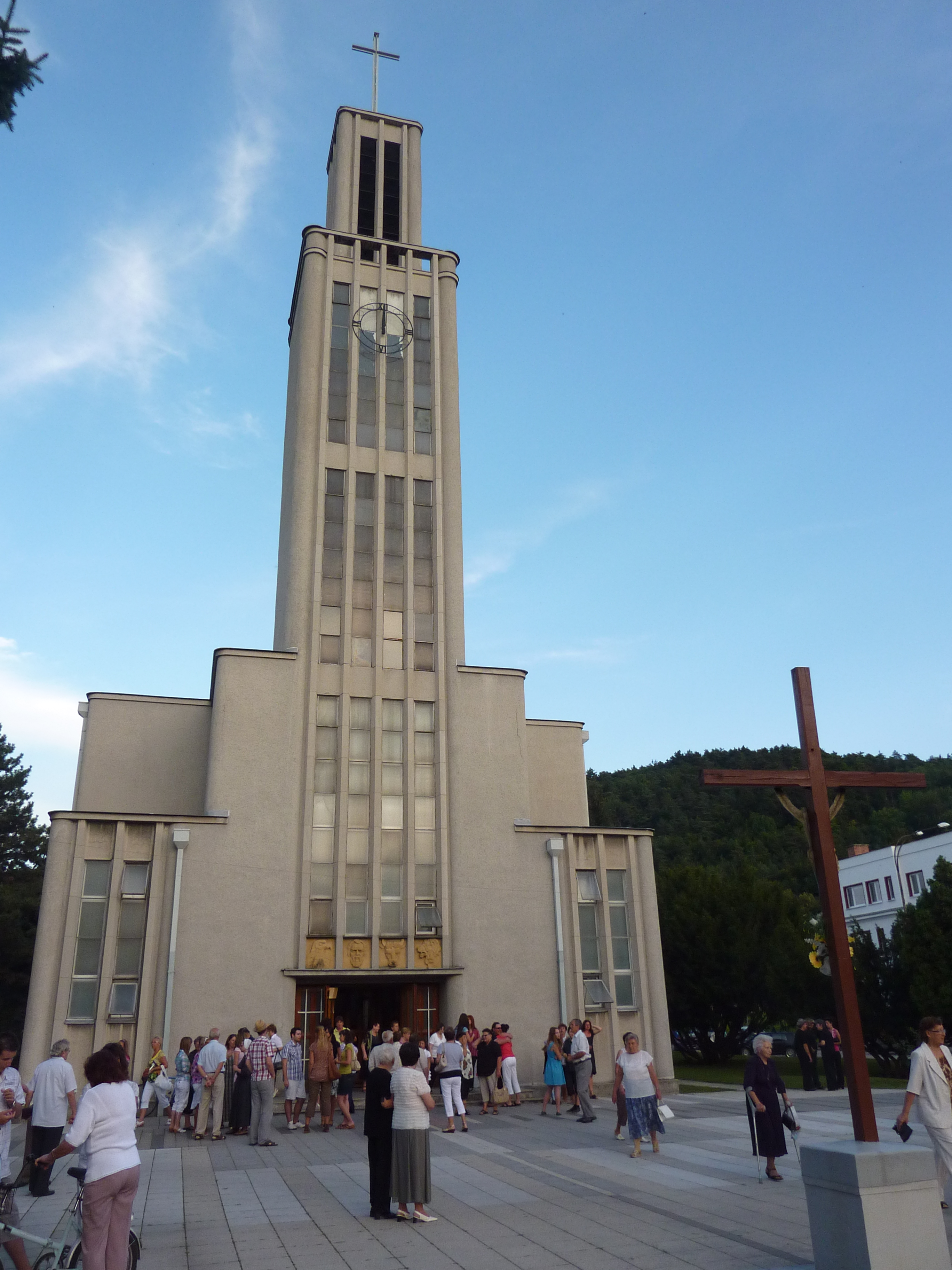 Partizánske, kostol Božského Srdca Ježišovho